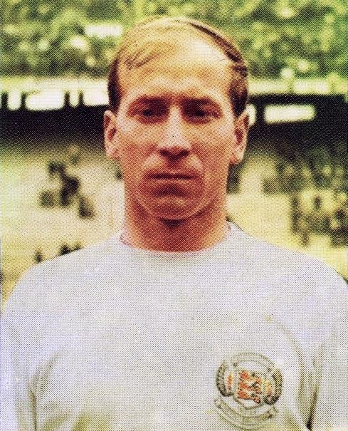 Bobby Charlton en 1966 - Campioni dello Sport 1966-1967, n°160